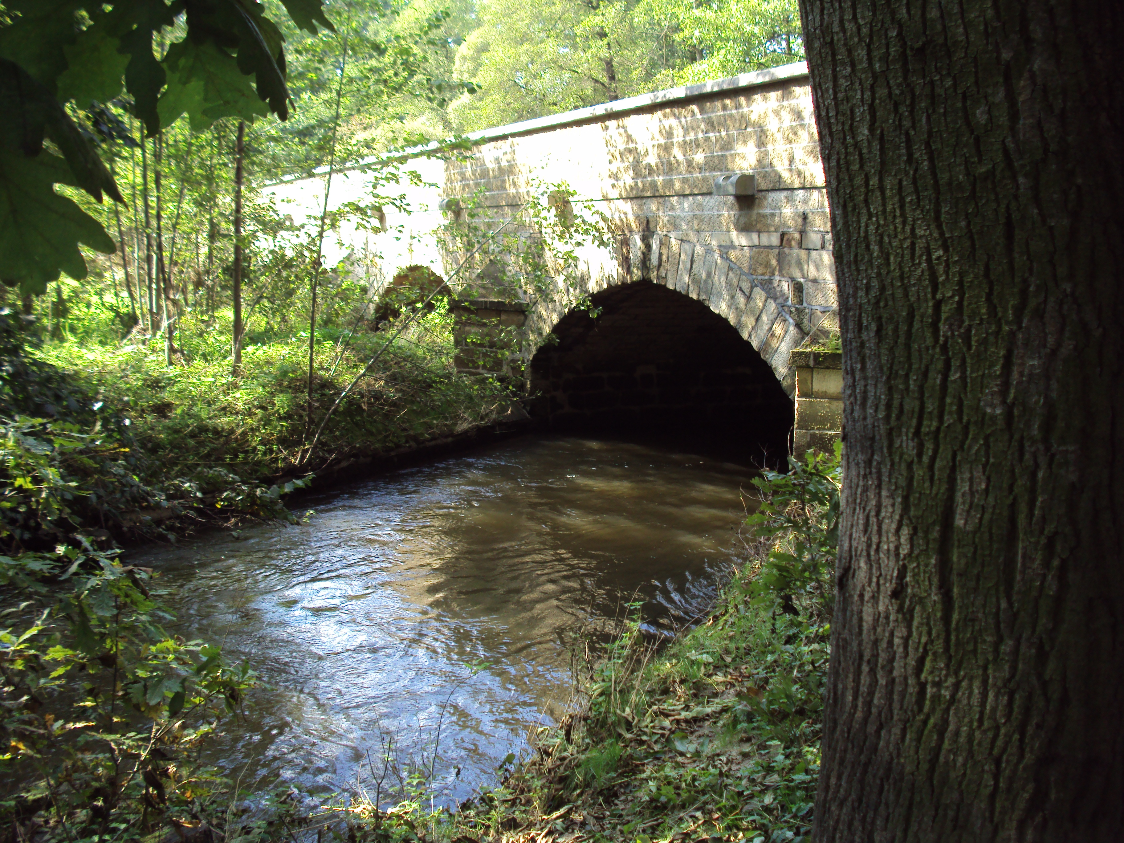 Silniční most přes Ploučnici u Brenského mlýna na Zákupsku